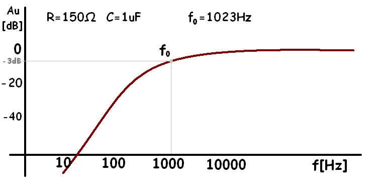 Graf závislosti zisku na frekvenci u horní propusti